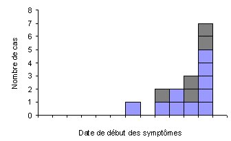 Courbe épidémique avec une case pour chaque unité (cas)